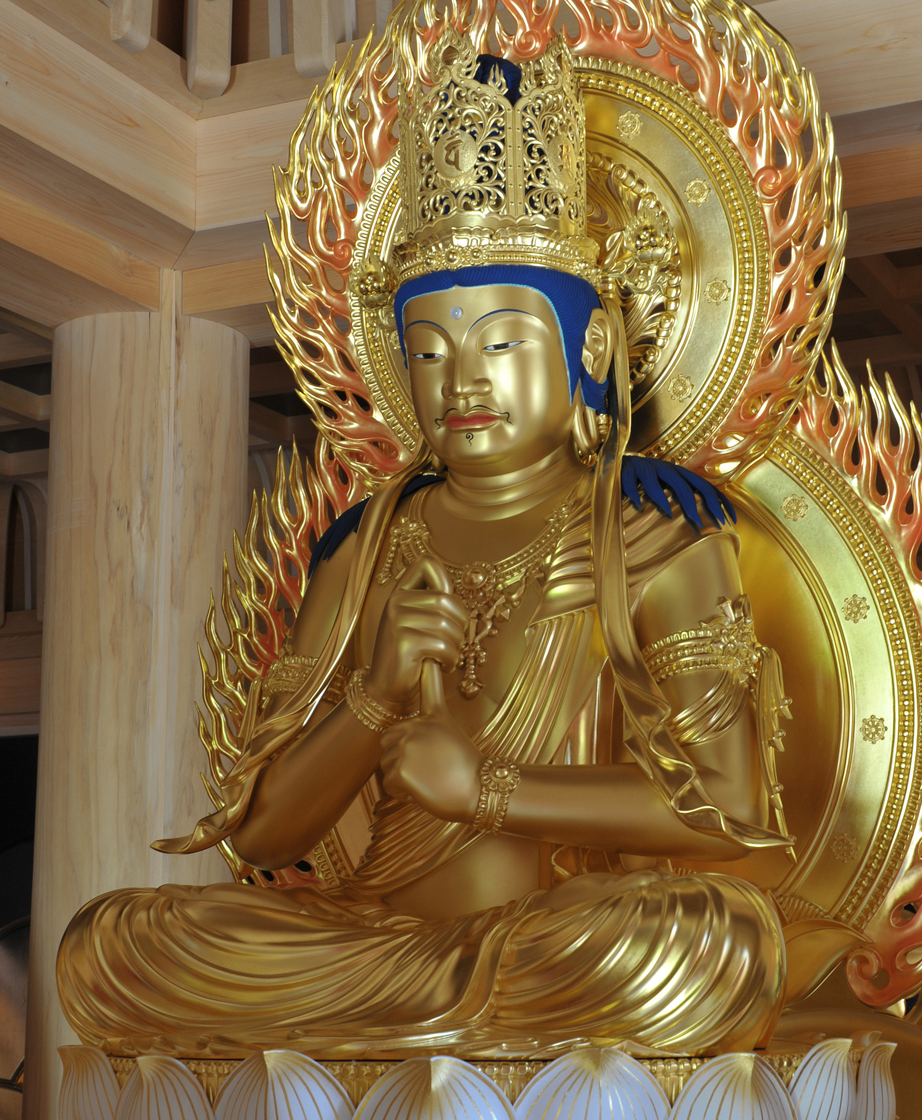 2018年5月12日に落成した蓮華院多宝塔に祀られる大日如来（五智如来の一体）。毎年1月13日・4月29日・6月13日にご開帳。